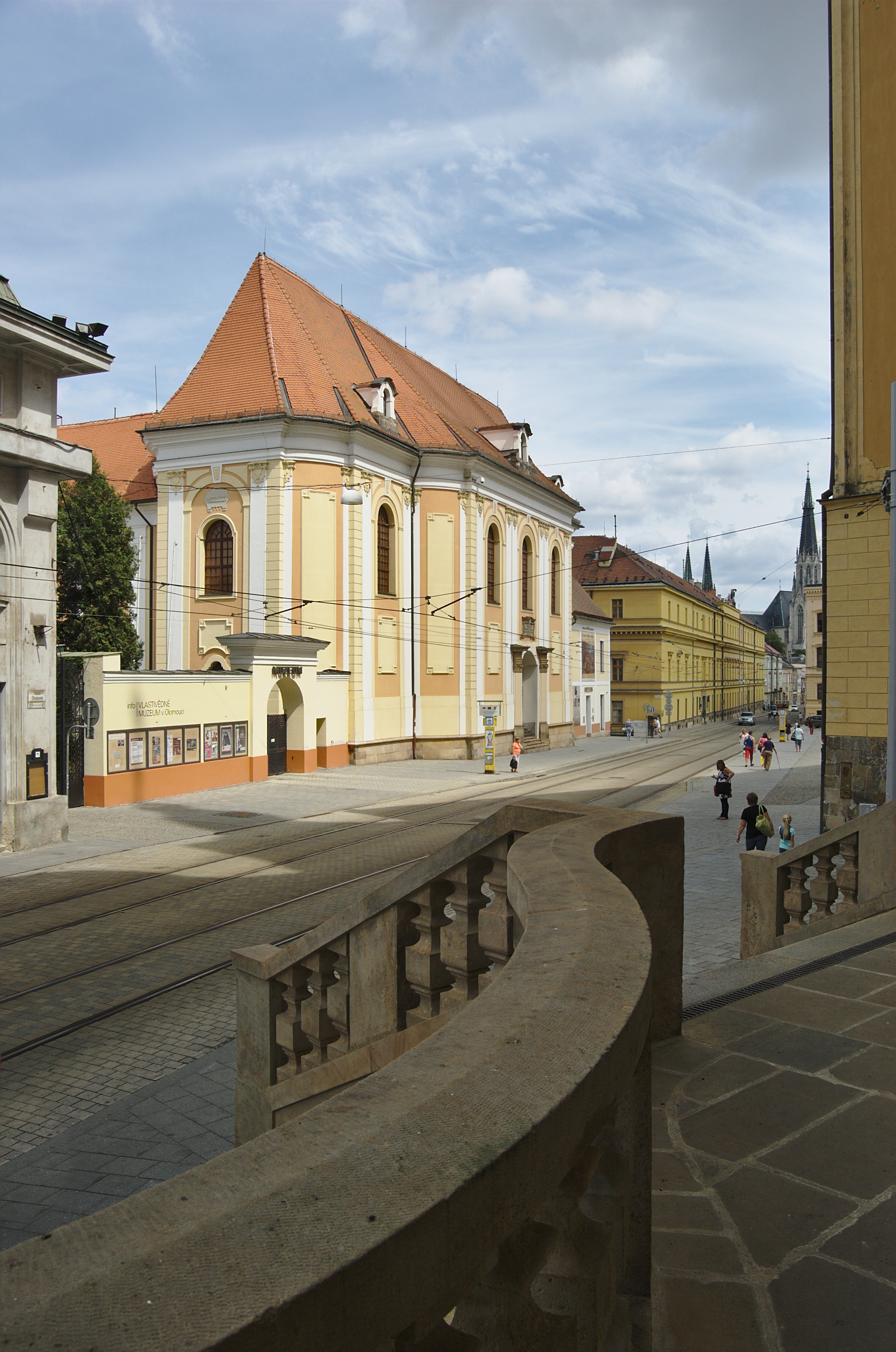 Klášter klarisek s kostelem svaté Kláry, Olomouc